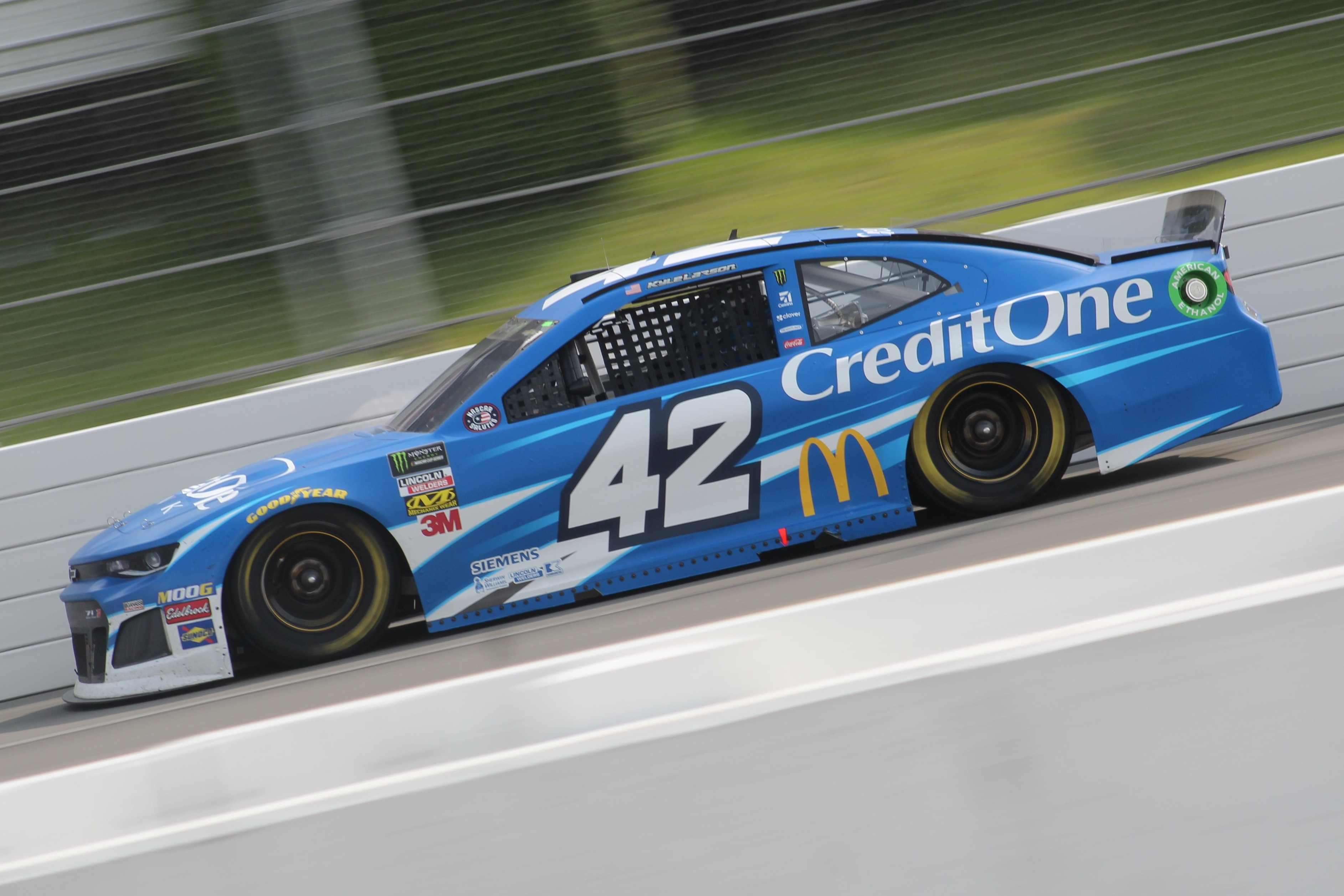 2019 Pocono 400